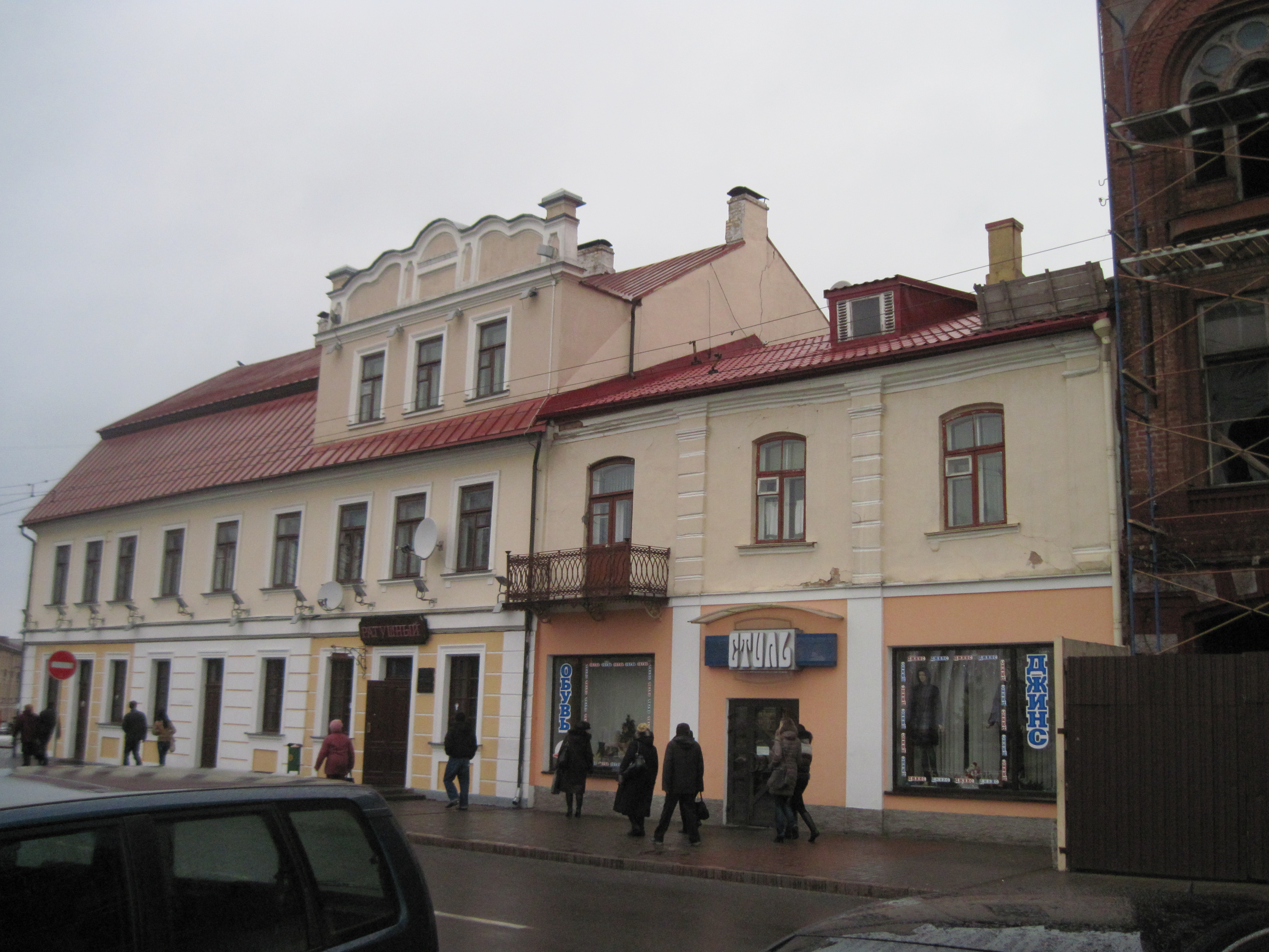 Беларуская (тарашкевіца): Фота дома №1 па пл. Савецкай